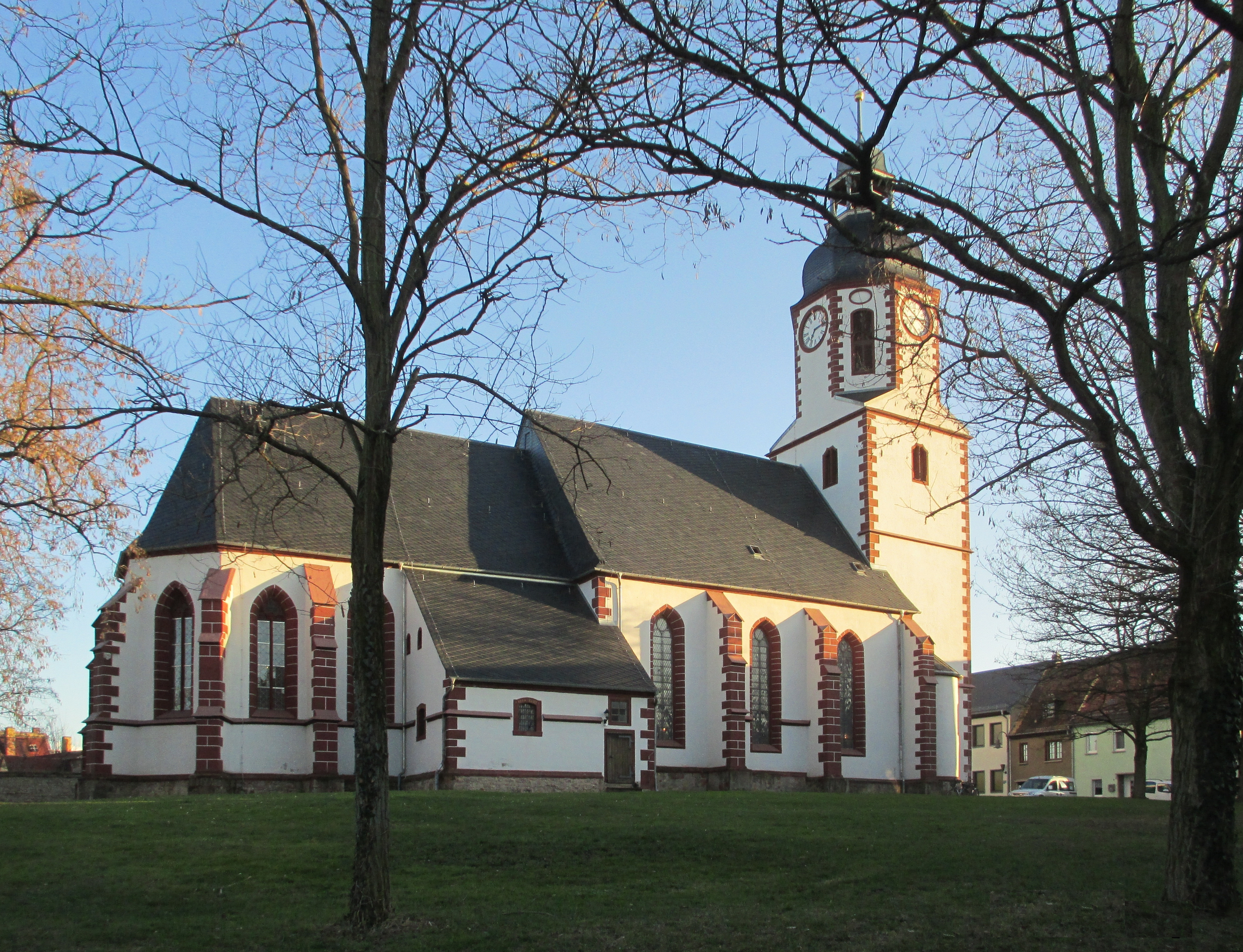 St.-Michaelis-Kirche Frohburg